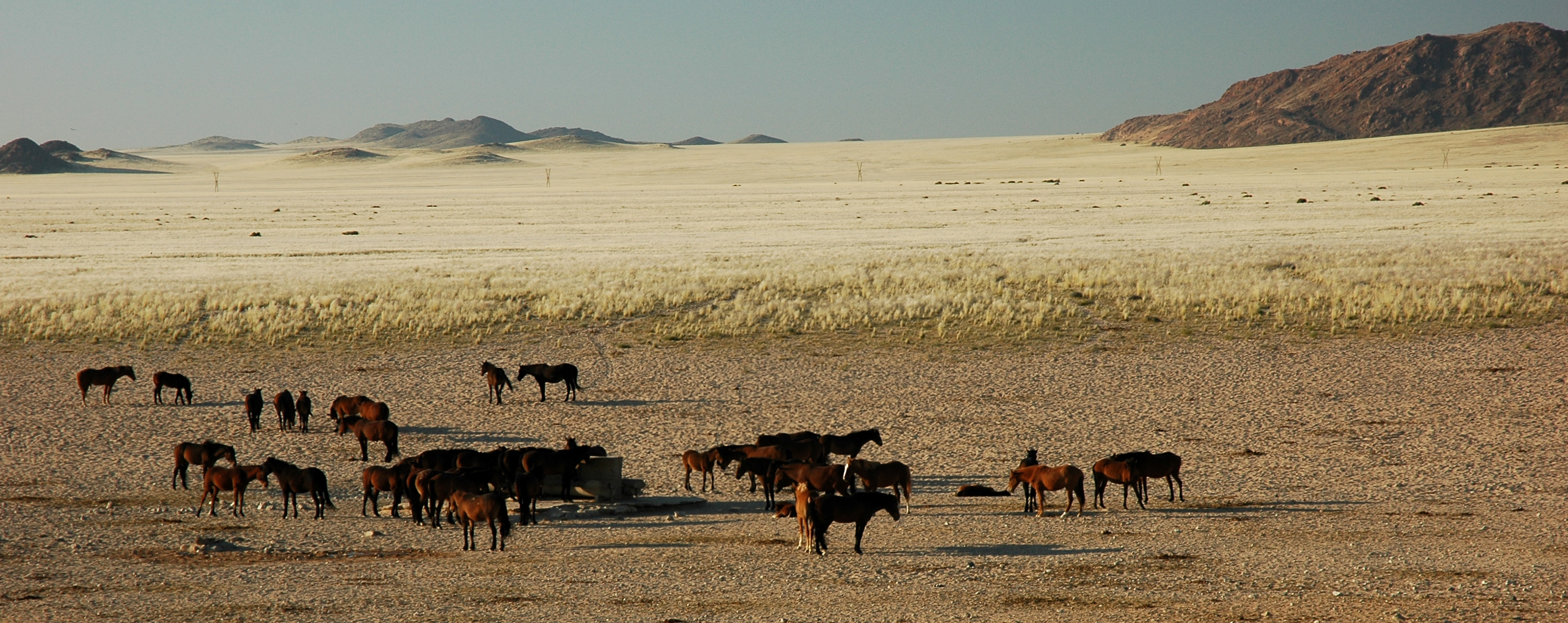 Namibie Photographie prise par GIRAUD Patrick